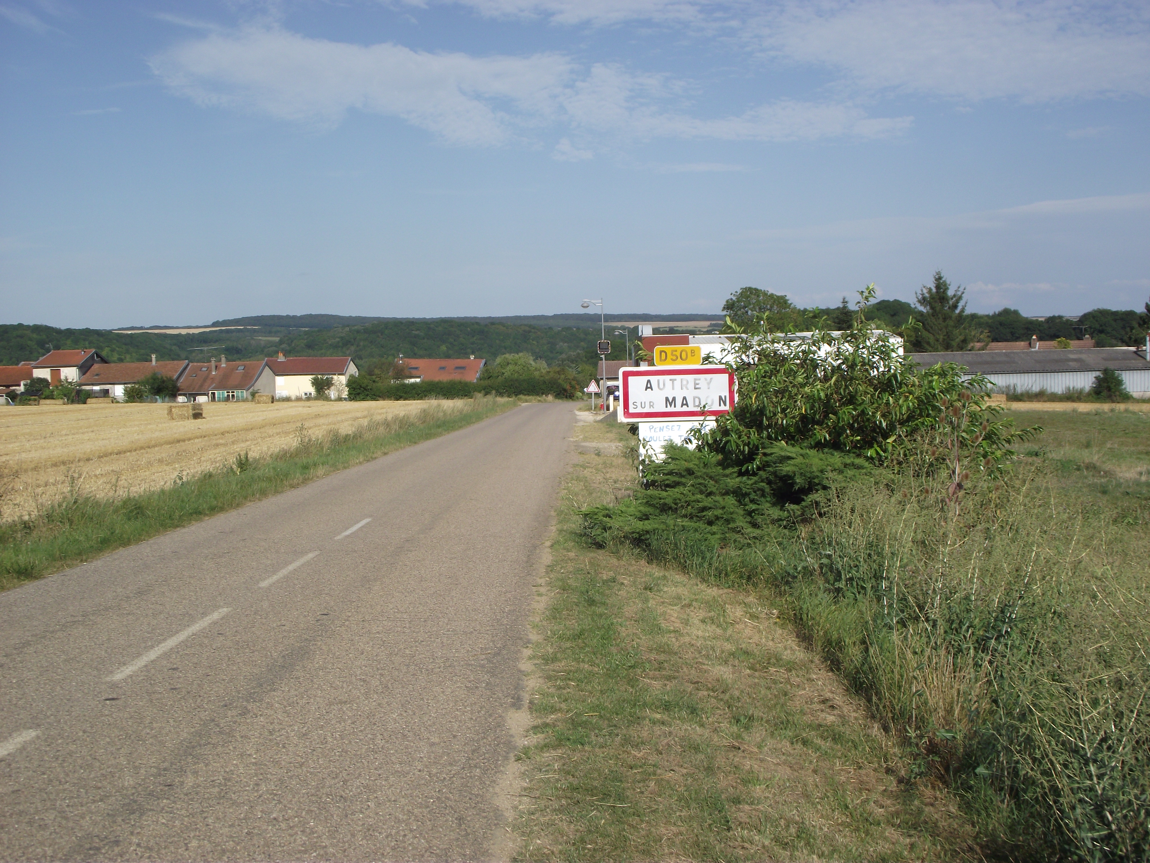 Entrée du village de Autrey-sur-Madon